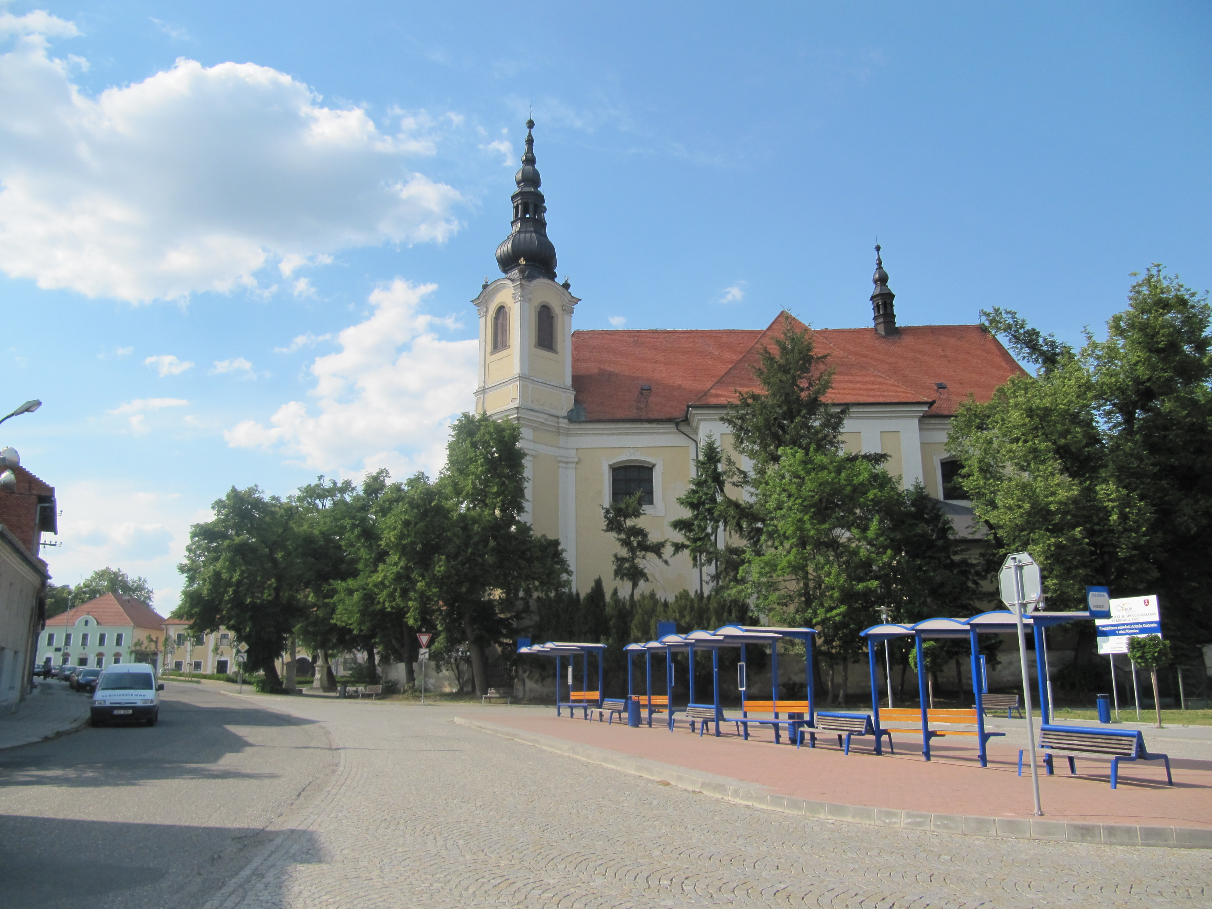 Kvasice